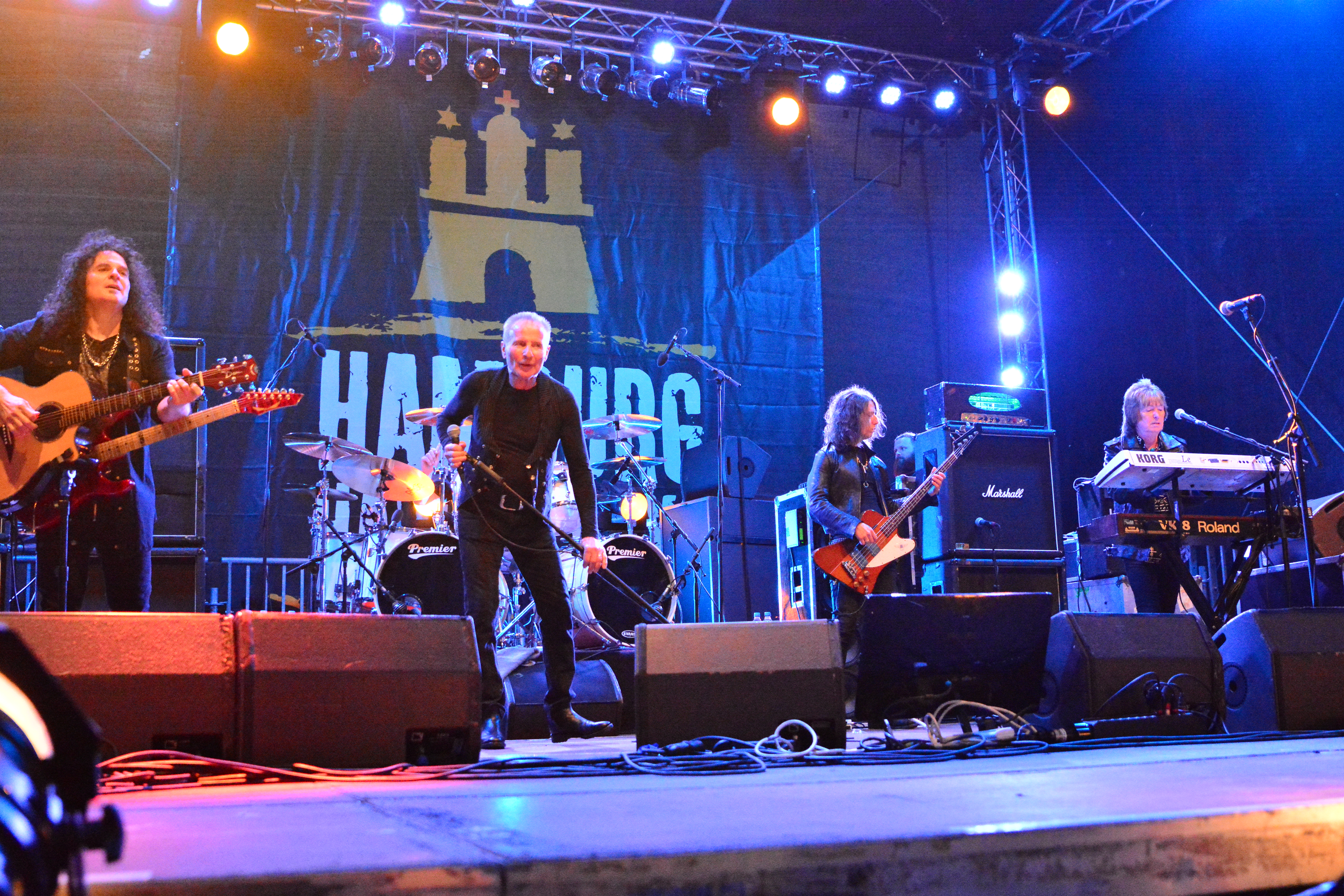 UFO bei den „Hamburg Harley Days“